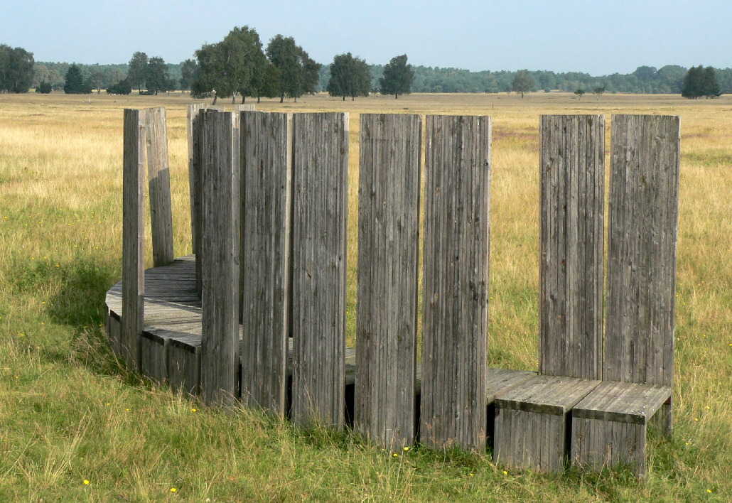 Camp Reinsehlen